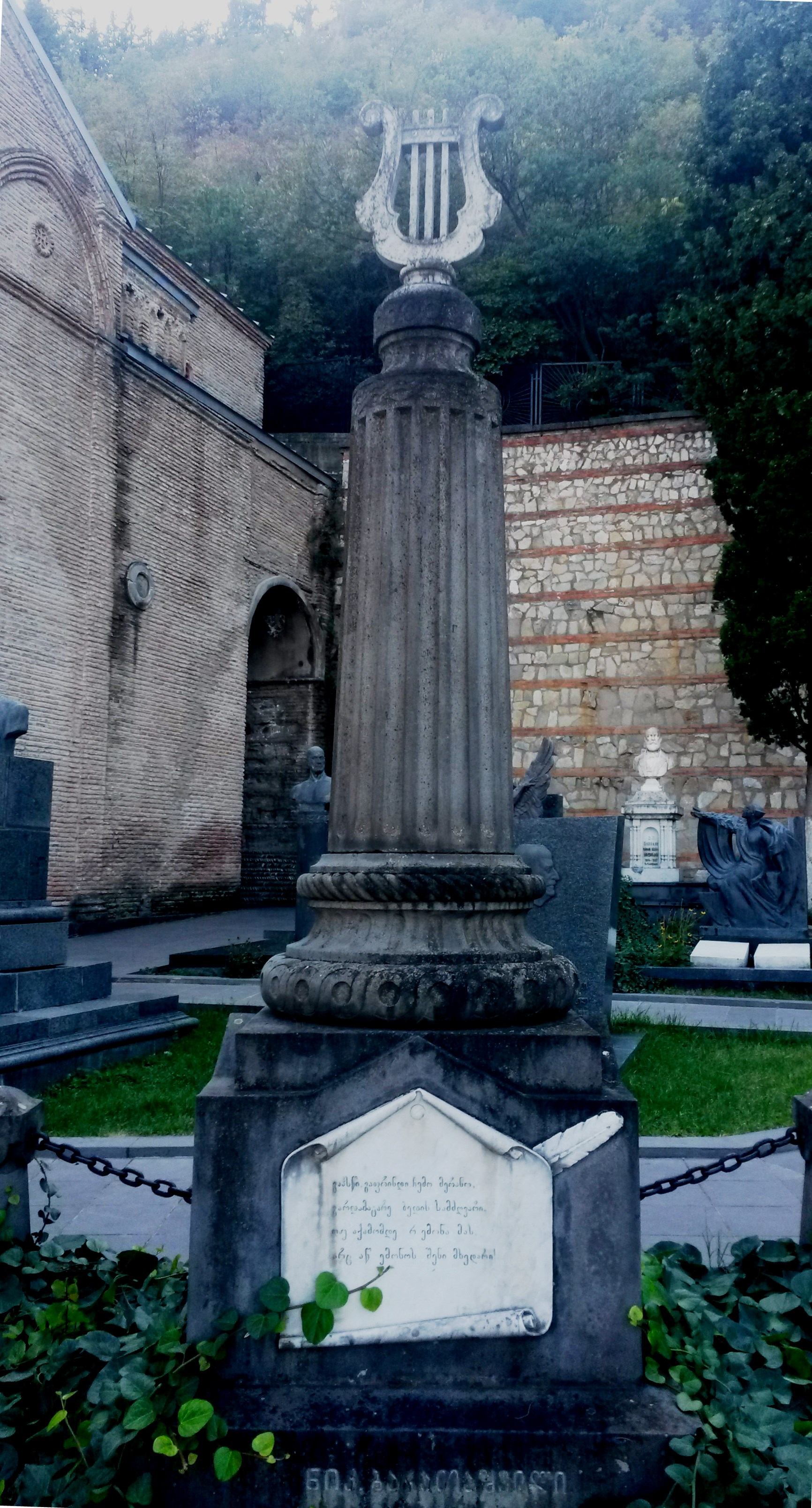 მთაწმინდის პანთეონი